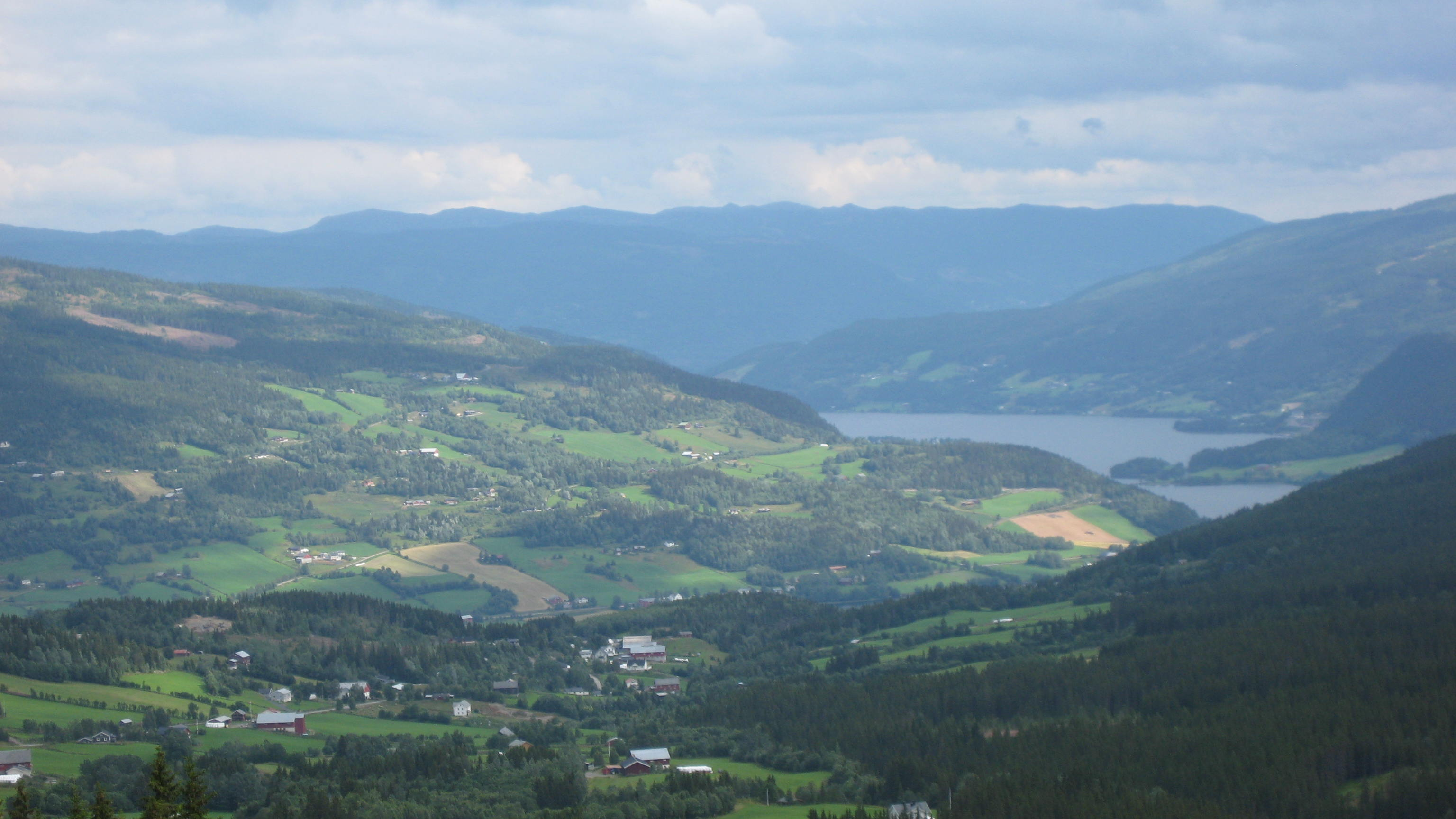 Nord.Aurdal sett fra Hippesbygde